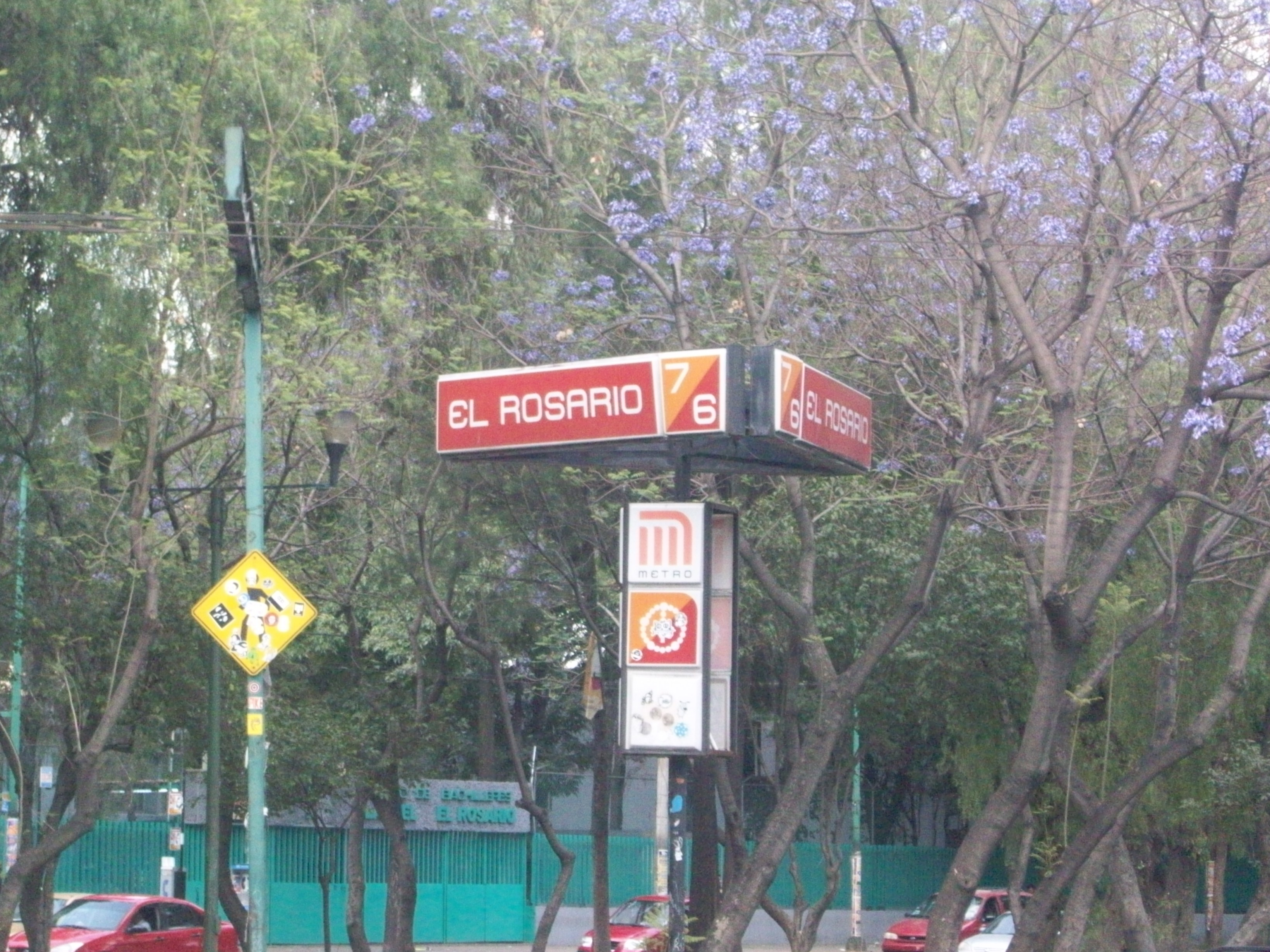 Letrero de la estación El Rosario